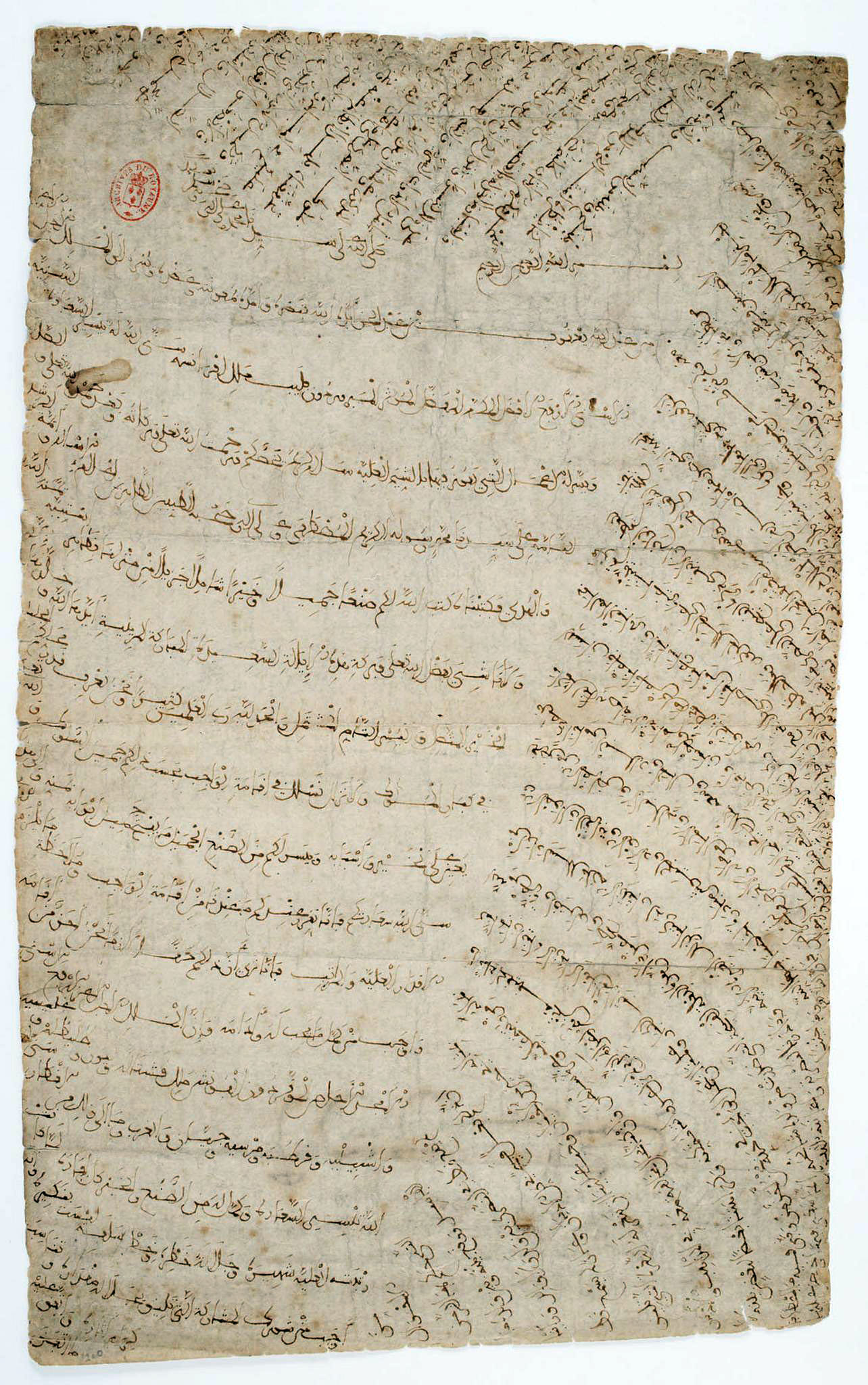 Lettre d'Abou-Yousouf, souverain du Maroc, à Philippe III, roi de France, pour l'engager à prendre les armes en faveur d'Alphonse X, roi de Castille et de León, attaqué par son fils Sanche. Document rédigé en arabe, daté du 24 octobre 1282.